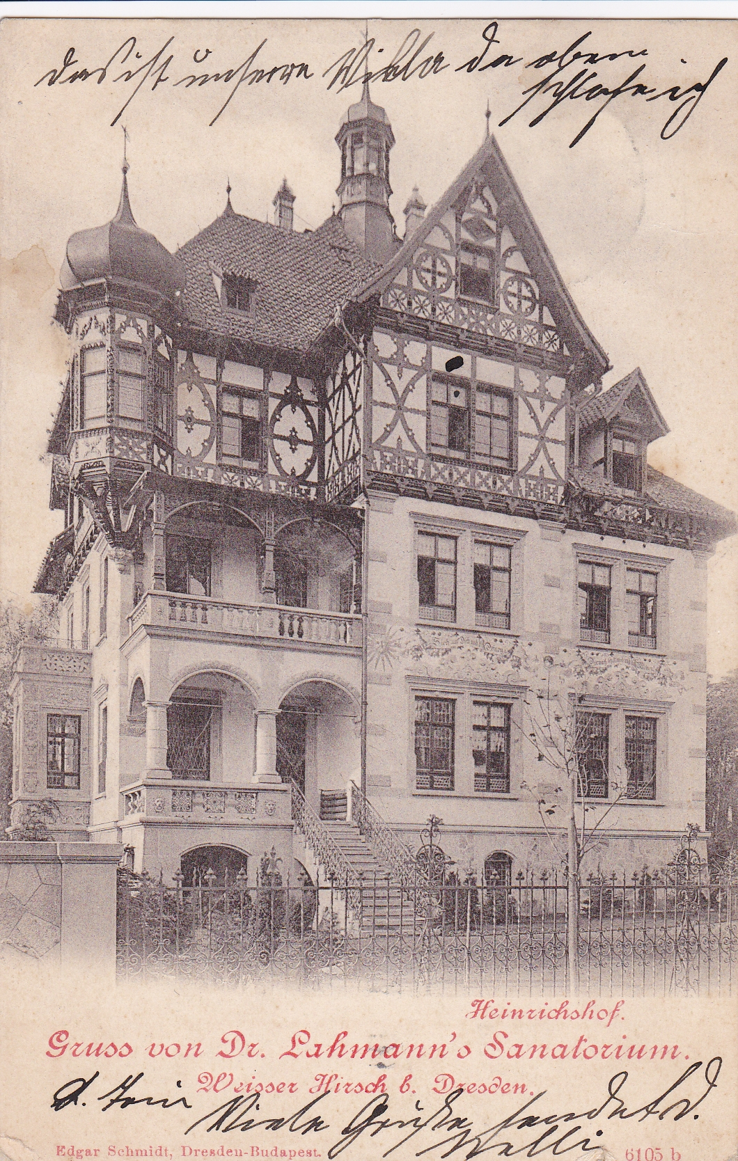 Ansicht der Villa "Heinrichshof", einem Teil von "Dr. Lahmanns Sanatorium" in Dresden - Weisser Hirsch. Am 11.März 1901 gelaufene Postkarte mit Ansicht des Gebäudes in schwarz-weiss-Lichtdruck nach Foto.